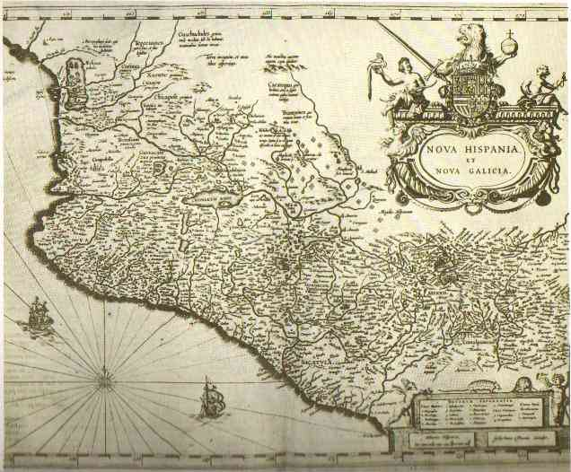 Mapa de la zona occidental del Virreinato, procedente de los atlas de Janssonio y Blaew (siglo XVI)